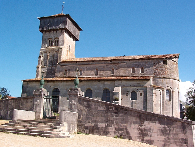 Vue extérieur de l'ancienne église de Dugny-sur-Meuse